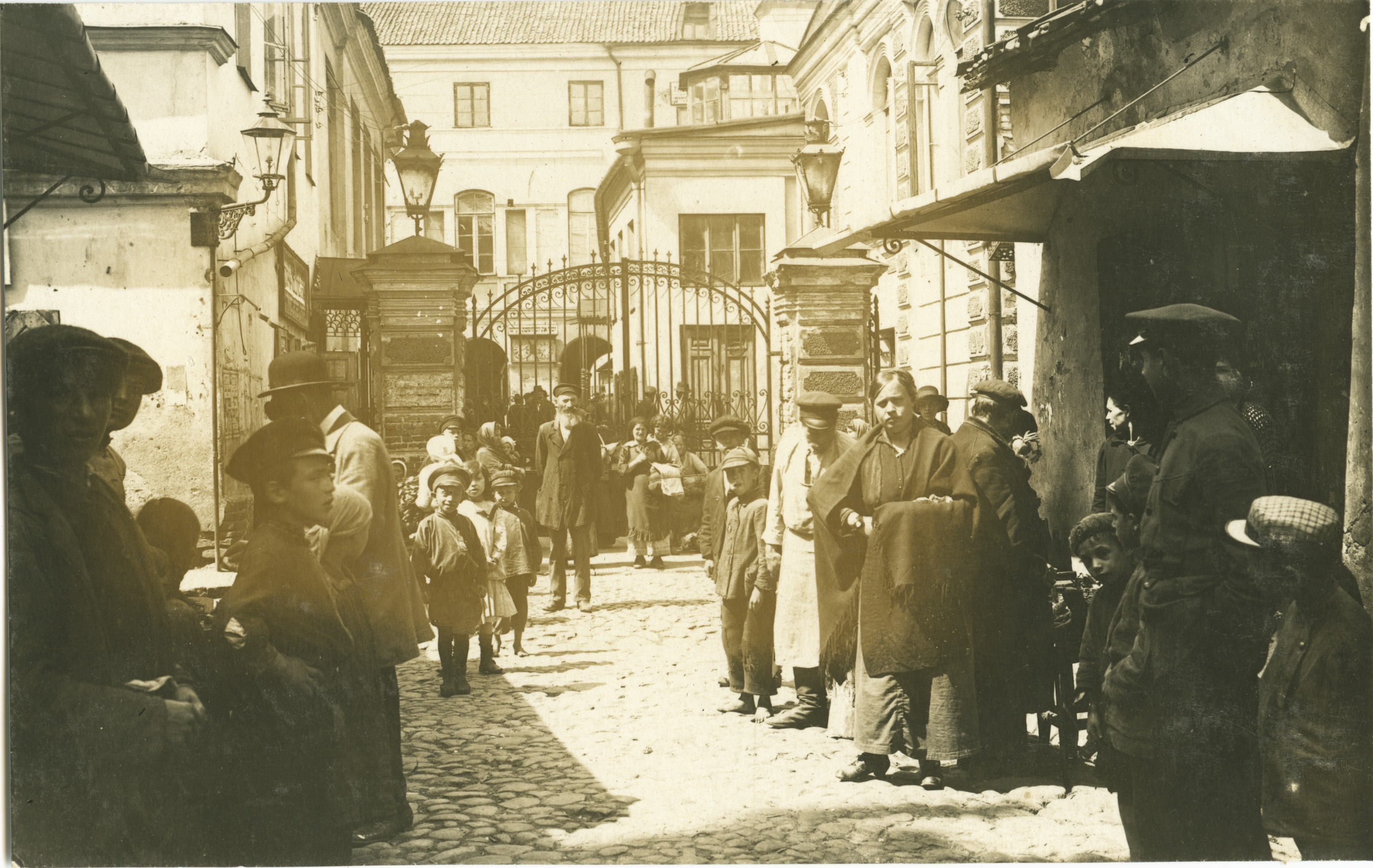 Vilniaus miesto gyventojai apie 1915-1916 m.